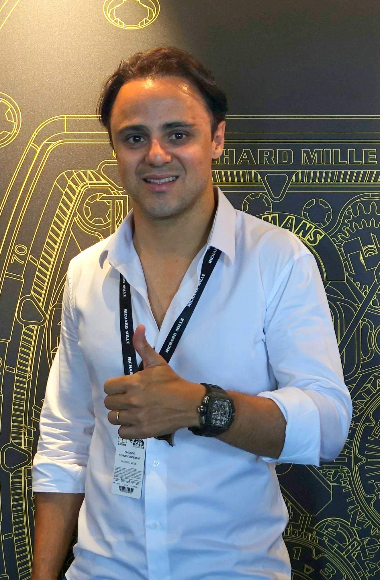 Felipe Massa chez Richard Mille au Le Mans Classic 2018